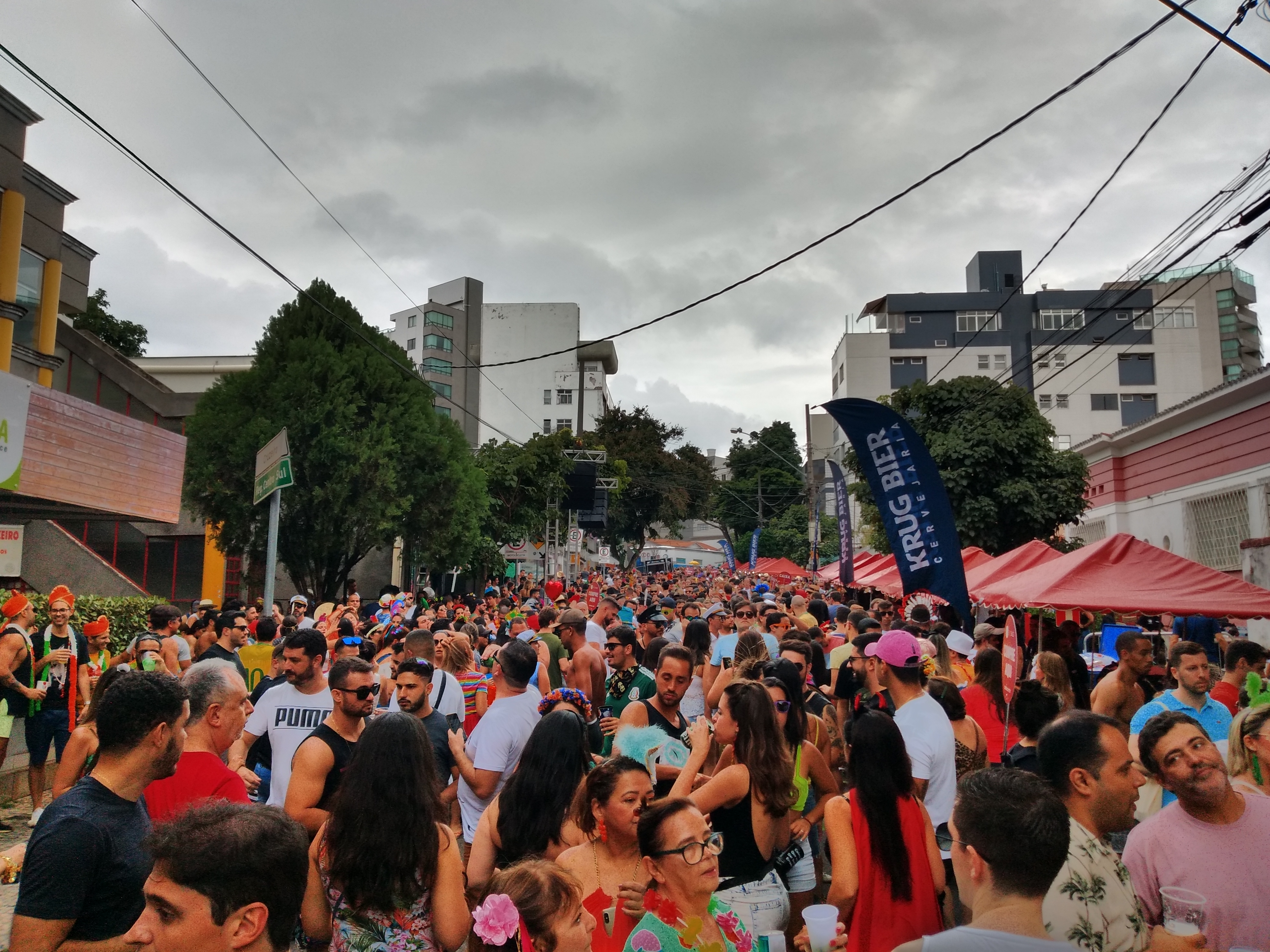 Carnaval na Rua Outono, no bairro Cruzeiro, em Belo Horizonte, em frente ao Restaurante Sabor & Vida, número 487.